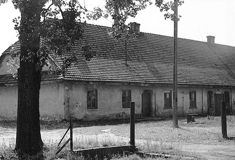 House in Korczewie of Polish landlord, Felicjan Otocki a member of the Second Russian State Duma, 1907